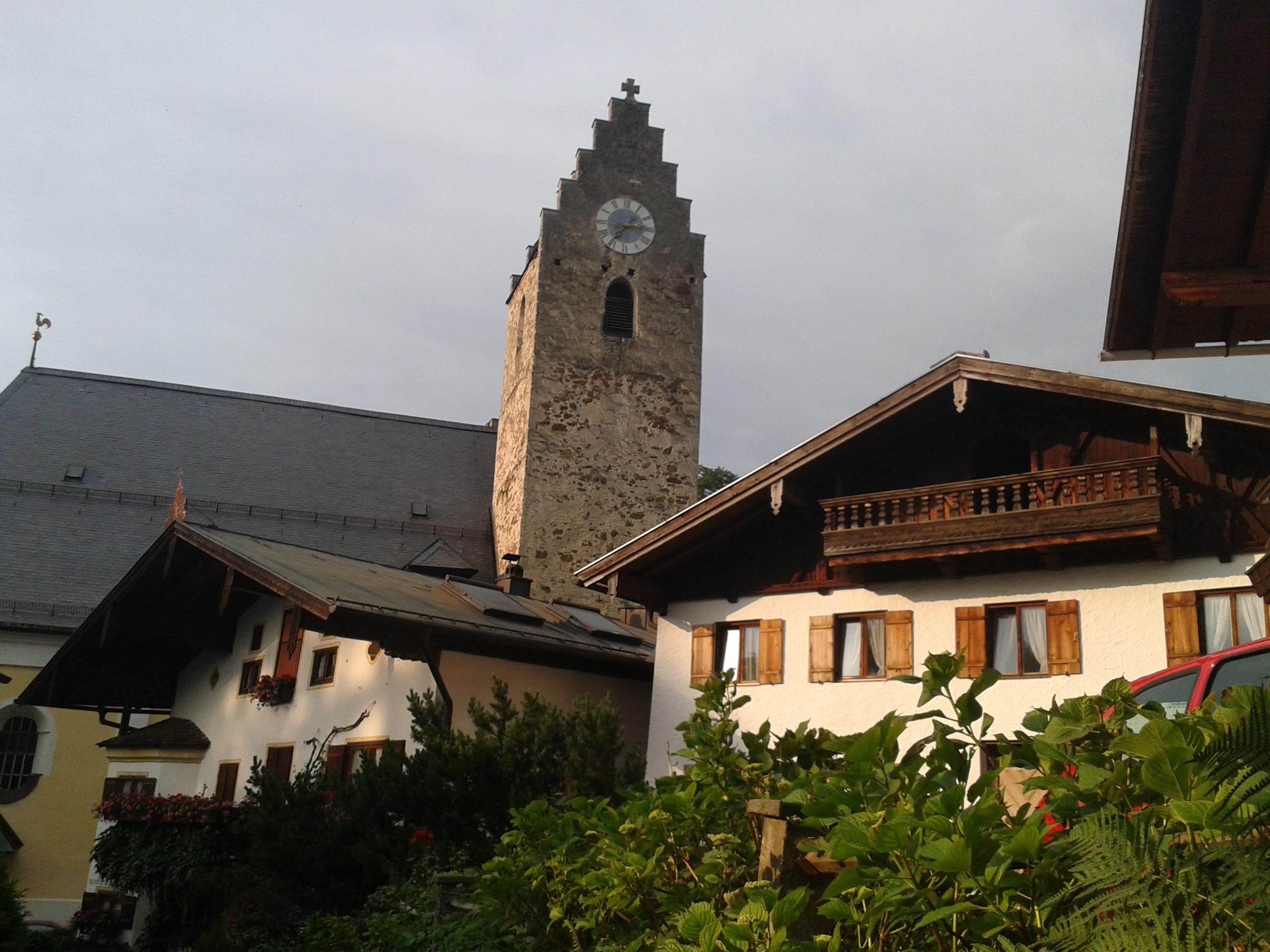 Zu sehen ist der Neubeurer Marktplatz im Landkreis Rosenheim. Im Zentrum des Bildes befindet sich die Kirche Mariä Empfängnis. Davor befinden sich historische Häuser.